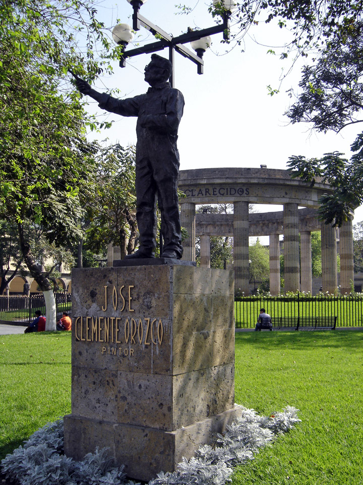 Jose Clemente Orozco